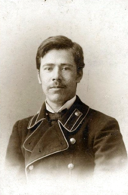 Фотопортрет Ивана Семеновича Куликова - академика живописи